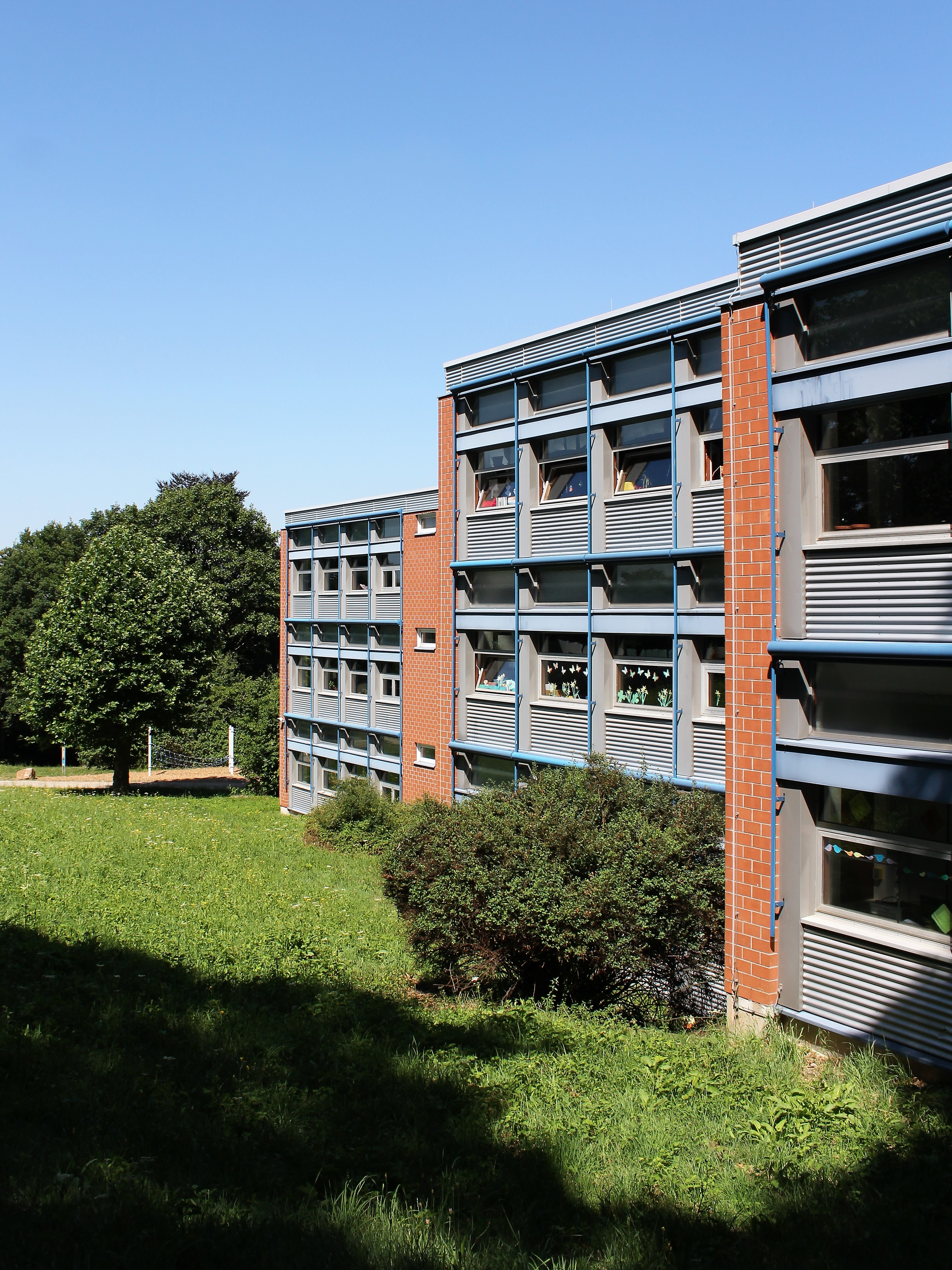 Gemeinschaftsschule „Waldparkschule“ in Heidelberg-Boxberg: Ansicht eines Teilbereichs des Schulgebäudes an der Südseite (genau: Südsüdost), der zur Straße „Am Waldrand“ hin gelegen ist.